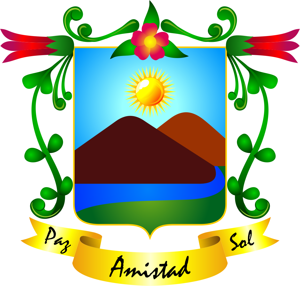 Distrito de Chaclacayo - Provincia de Lima - Región Lima